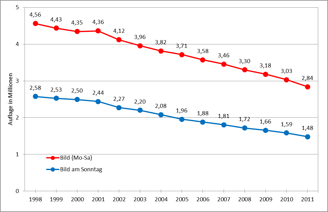 Verkaufte Auflage der „Bild“ und „Bild am Sonntag“ von 1998 bis 2011 anhand der Quartalszahlen im Jahresdurchschnitt (Quelle: IVW)